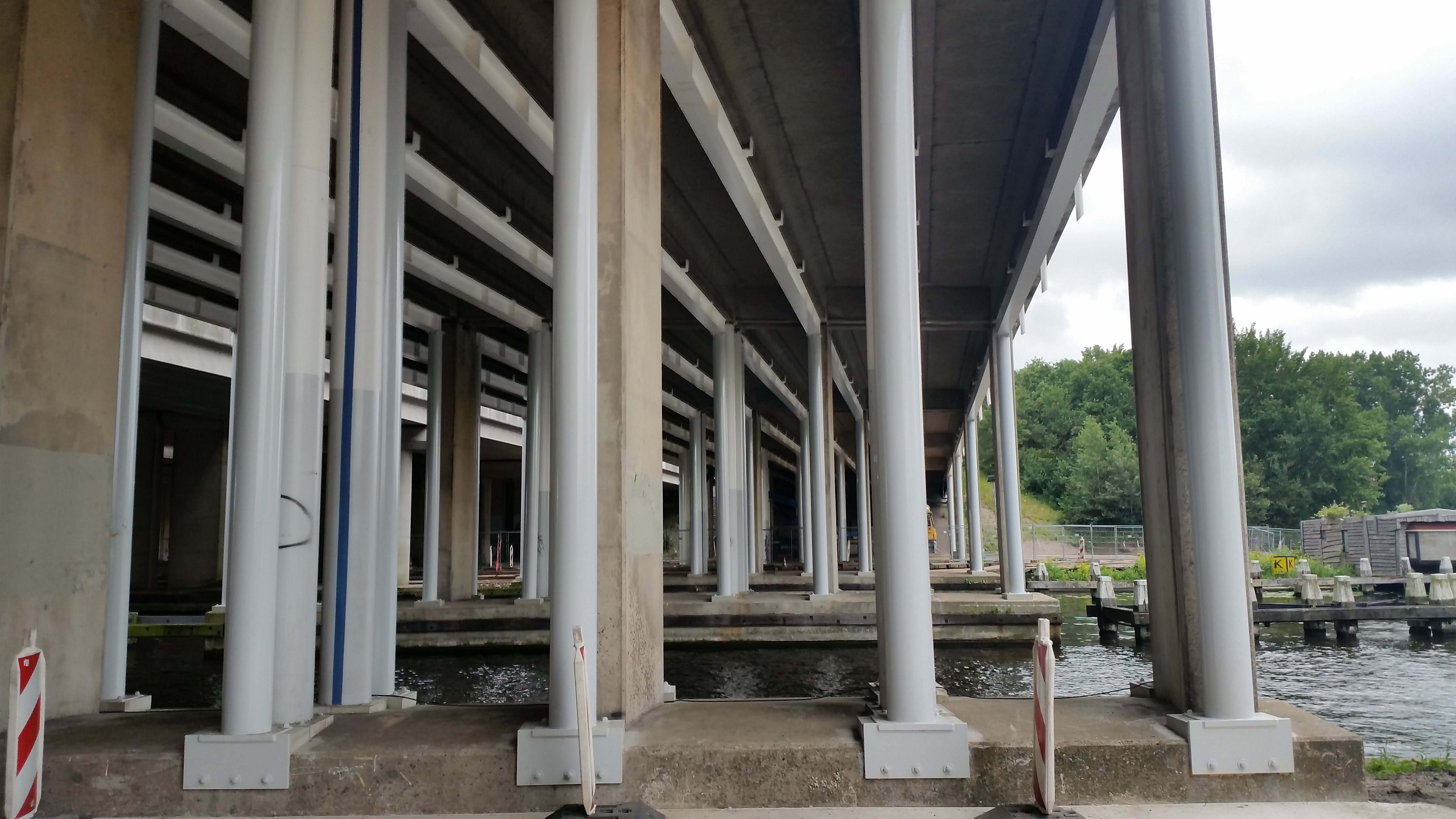 Oude en nieuwe kolommen onder Ringvaartviaduct A4